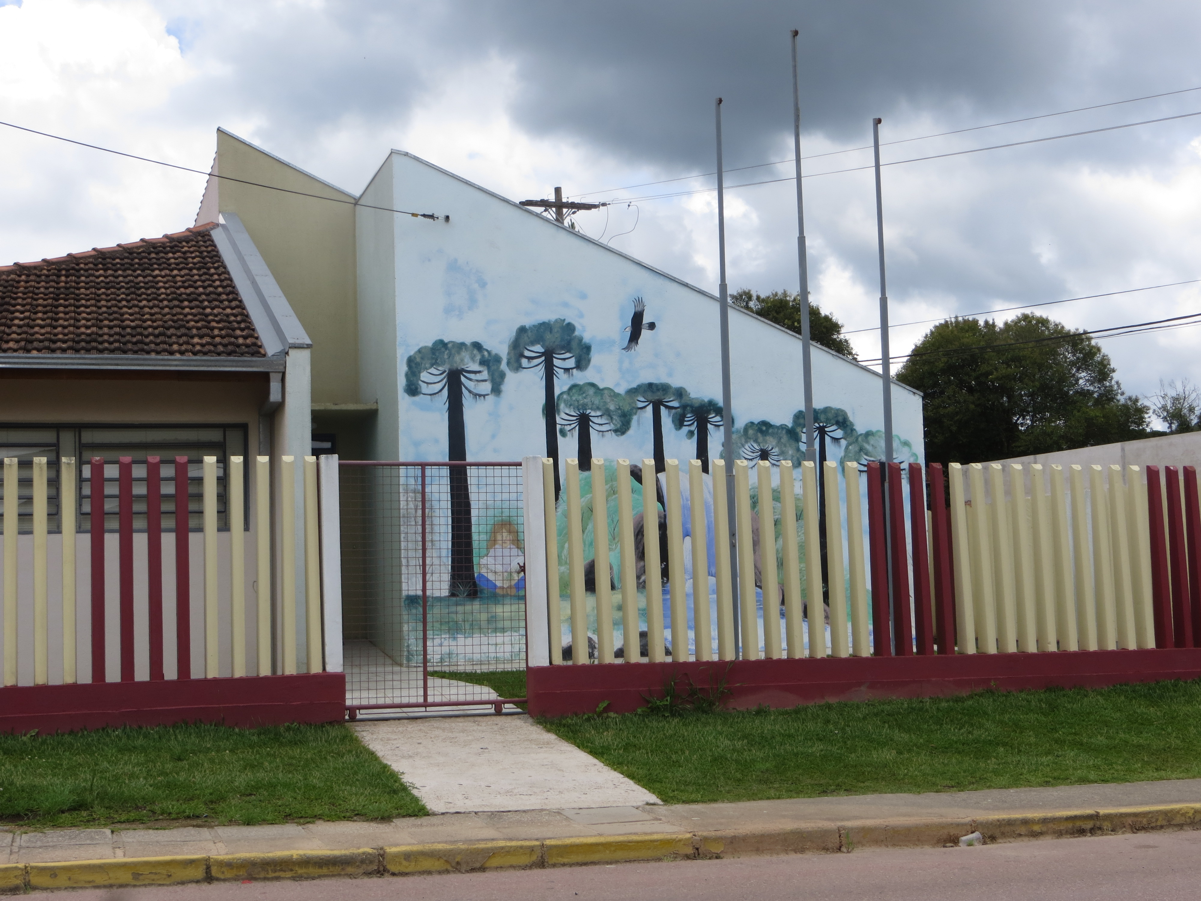 Biblioteca Cidadã de Piên, Estado do Paraná, Região Sul do Brasil